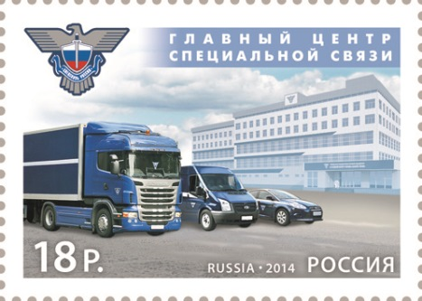 Почтовая марка «Главный центр специальной связи» Художник-дизайнер: А. Дробышев. Номинал: 18 рублей. Размер марки: 42×30 мм, размер листа: 146×170 мм. Форма выпуска: марочный лист из 15 (3х5) марок. Тираж: 375 тыс. экз. (25 тыс. листов).